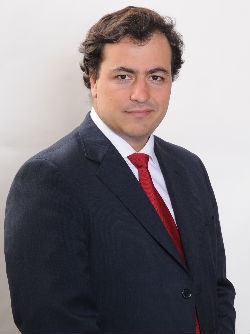 Gonzalo Arenas Hodar